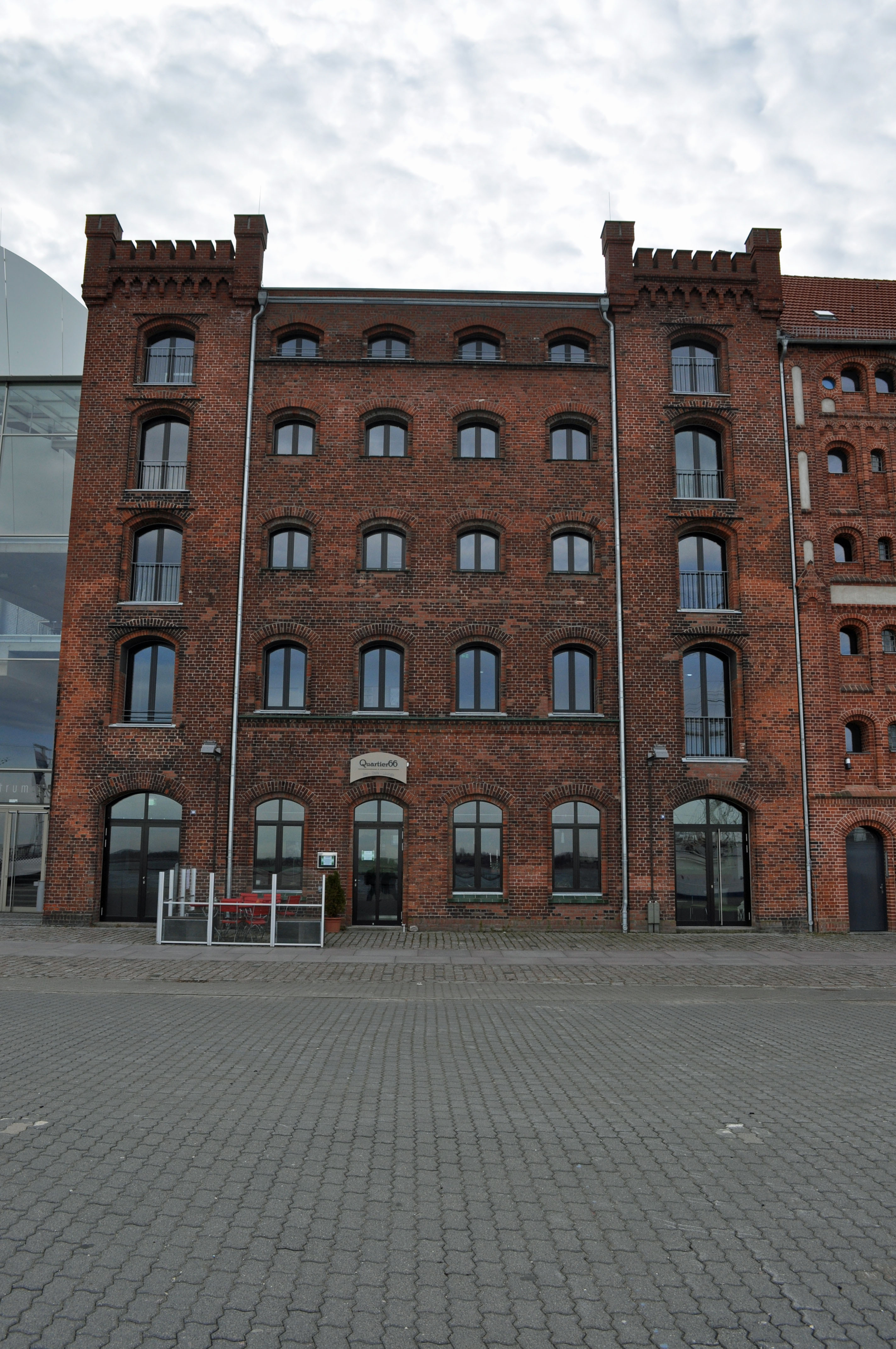 Gebäude bzw. Gebäudedetail in Stralsund. Straße und Hausnummer siehe Dateiname.